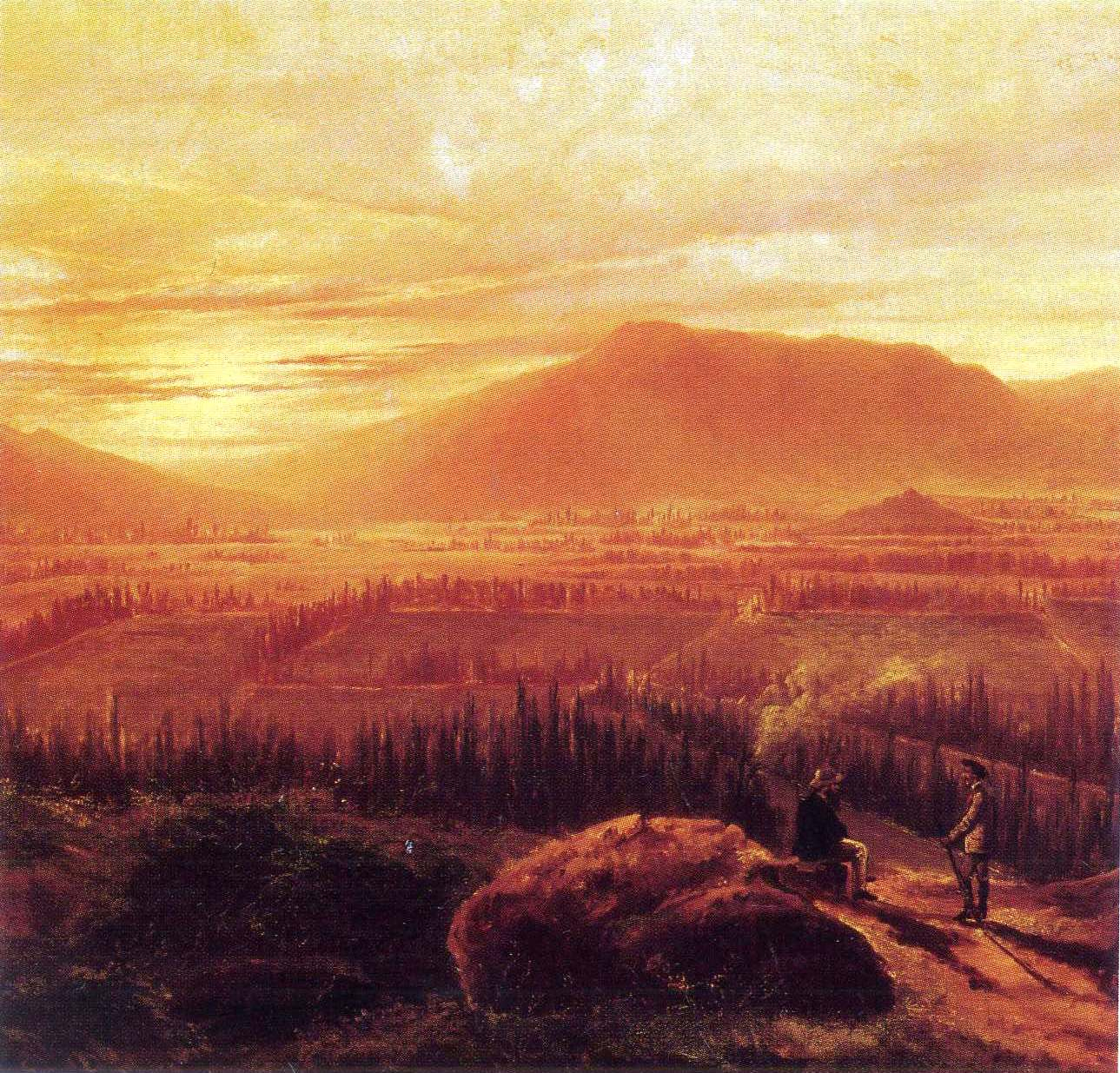 Antonio Smith. Santiago desde Peñalolén, c. 1875. Colección particular.